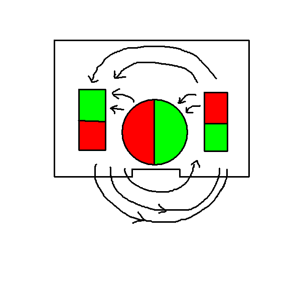 Skizze des Magnetfeldes eine Lasthebemagnets im eingeschalteten Zustand. Am Polschuh links sind die roten Nordpole angeordnet, rechts die grünen Südpole.